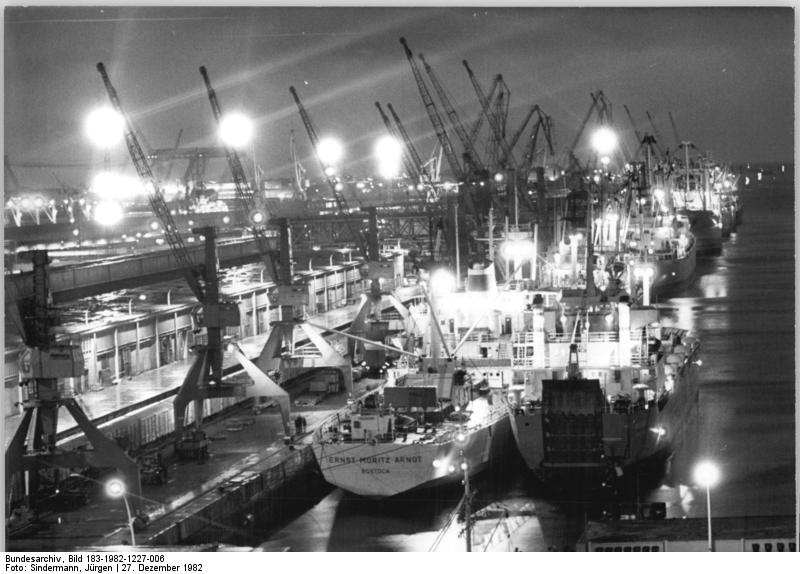 Rostock, Überseehafen, Nacht ADN-ZB Sindermann 27.12.82 Rostock: Reger Umschlagsbetrieb herrscht auch an den letzten Tagen des Jahres an den Kais des Rostocker Überseehafens. Erstmals in der Geschichte erreichten die Hafenarbeiter in Rostock, Wismar und Stralsund einen Gesamt-Umschlag von 20 Millionen Tonnen Güter. Umfangreiche Rekonstruktionsarbeiten in Rostock werden künftig für eine noch schnellere Hafendurchlaufzeit für in- und ausländische Schiffe sorgen. -siehe auch 1982-1227-4 und 5N